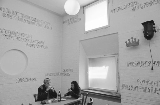 Studierende am Lehr- und Lerntheater Bayerische Theaterakademie August Everding in München, 1998 Aufnahme aus der Reportage „Eine Szene machen, Regie, Schauspiel, Tanz und Gesang und - Kritik: Ein Streifzug durch die Bayerische Theaterakademie“, S. 64-80. In: Prinzregententheater, Jahrbuch 1999 C. Hartmann Verlag ISBN 3980610519